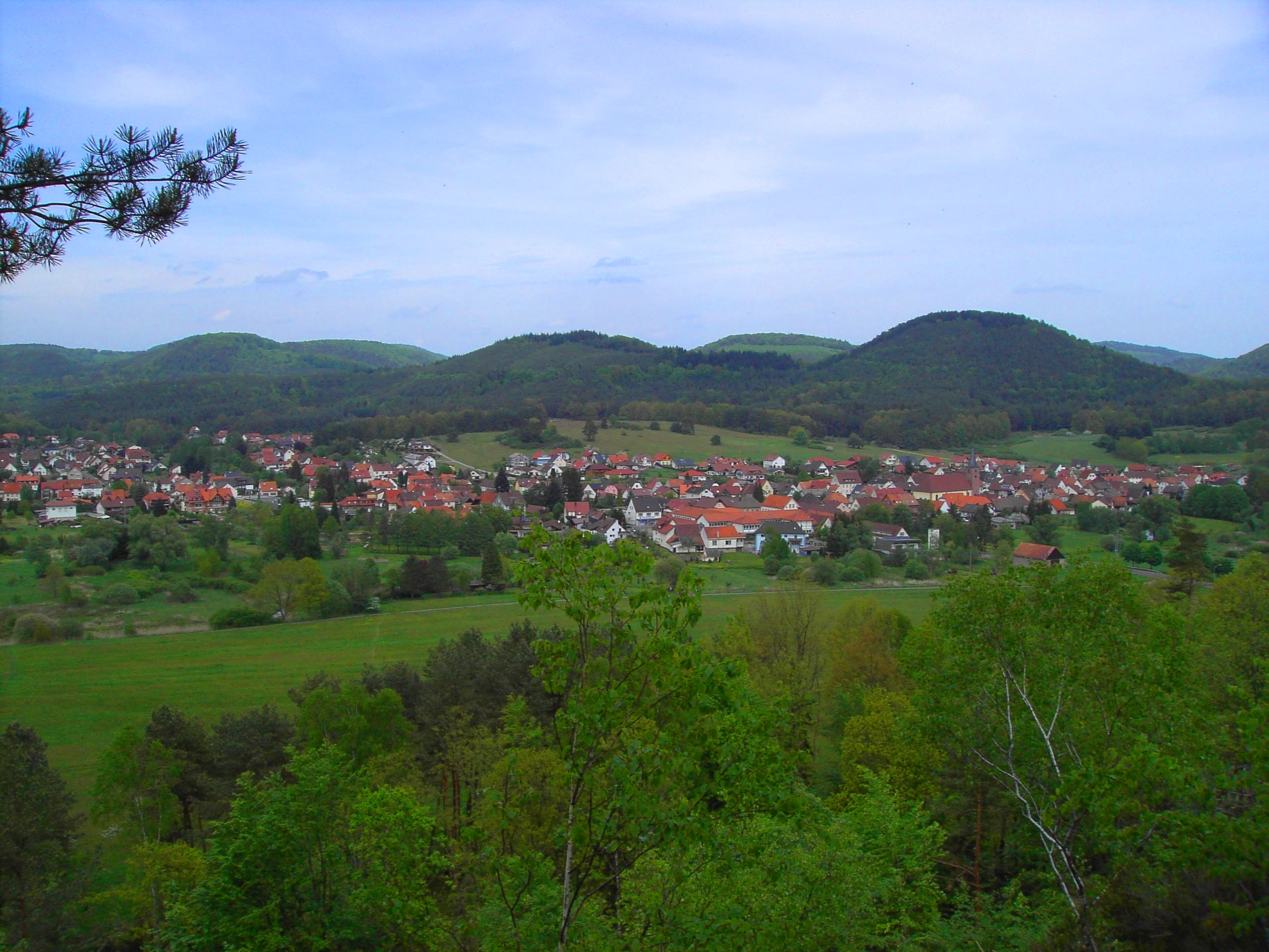 Blick auf Fischbach bei Dahn vom Hinzenfelsen